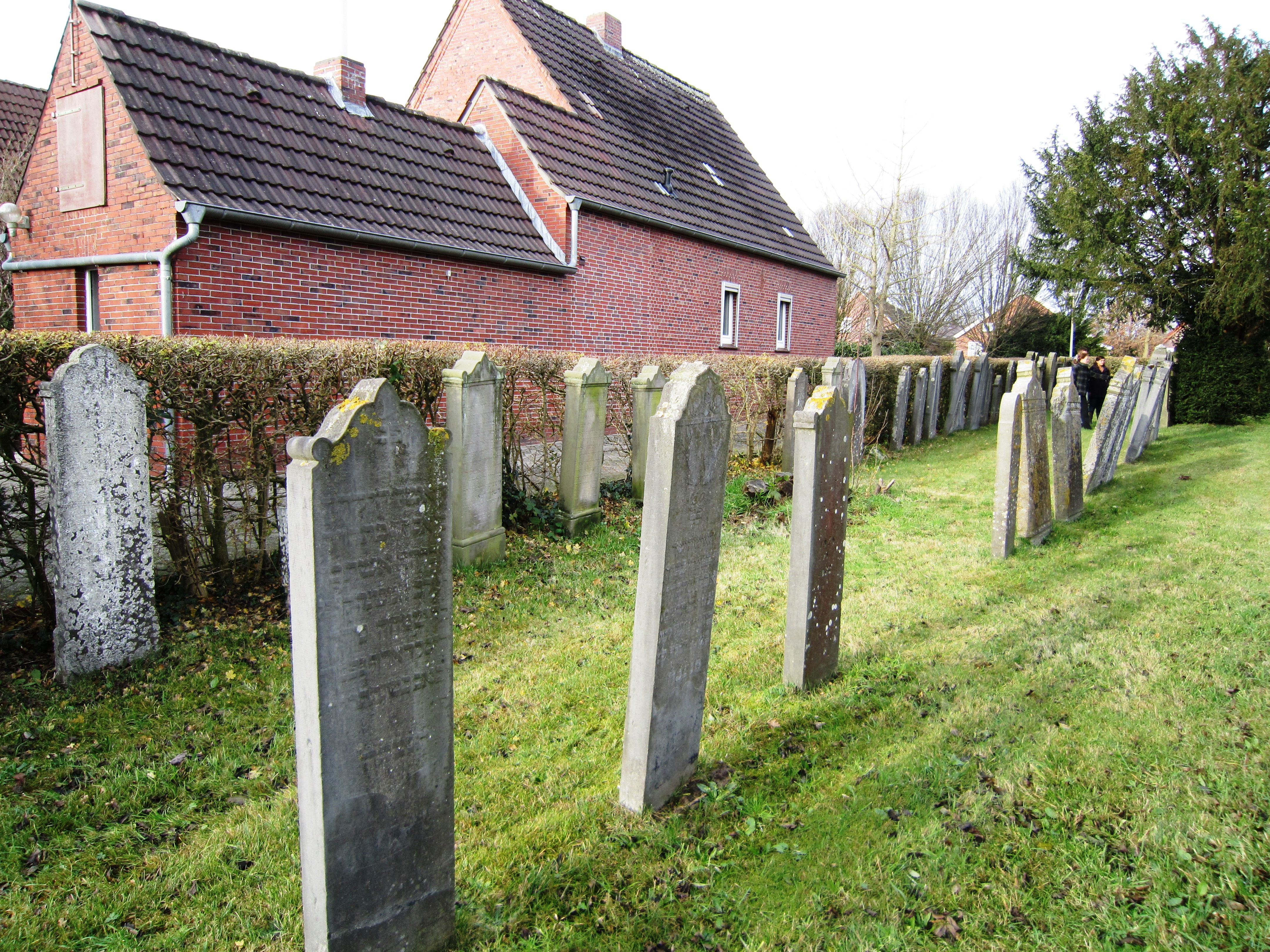 Weener Joods kerkhof